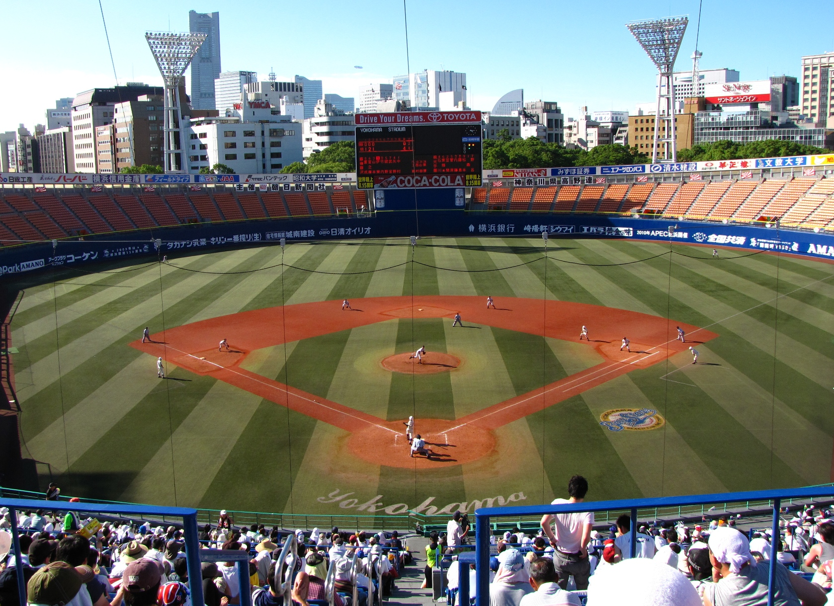 全国高等学校野球選手権大会－神奈川県予選大会